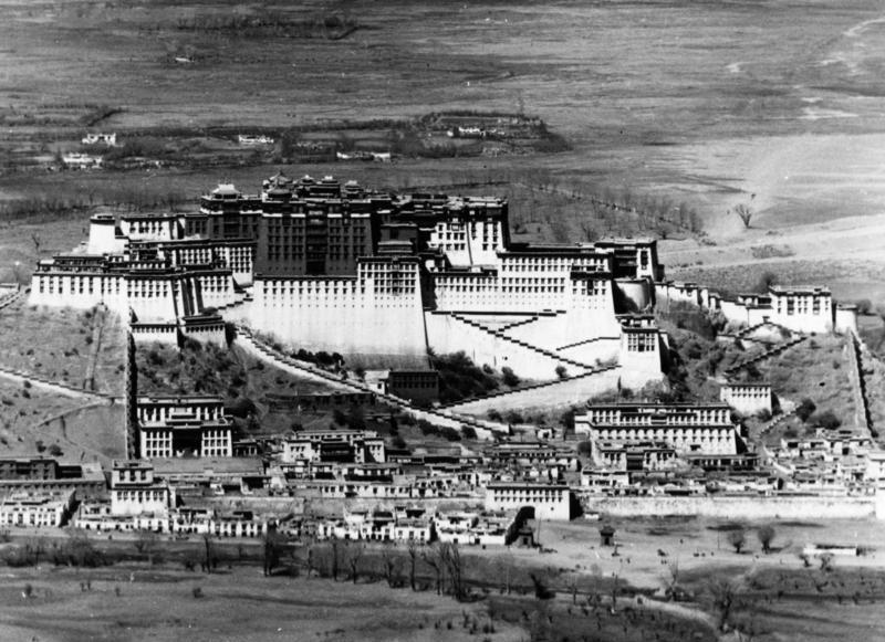 Lhasa, Blick auf Potala